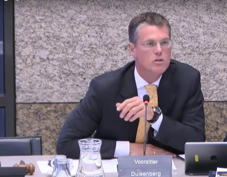 P.J. Duisenberg, voorzitter van de vaste commissie voor Financiën (VVD)